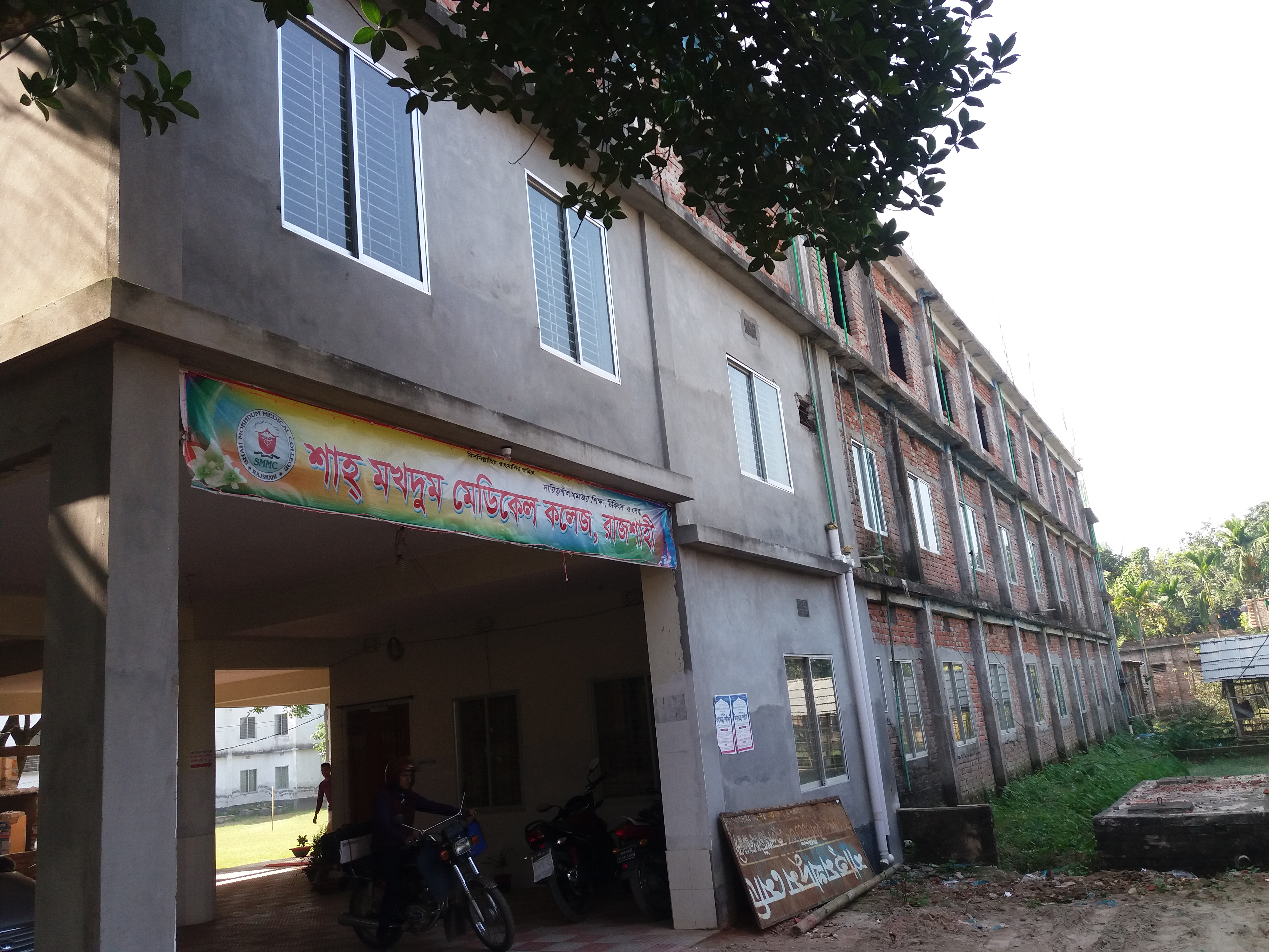 একাডেমিক ভবন